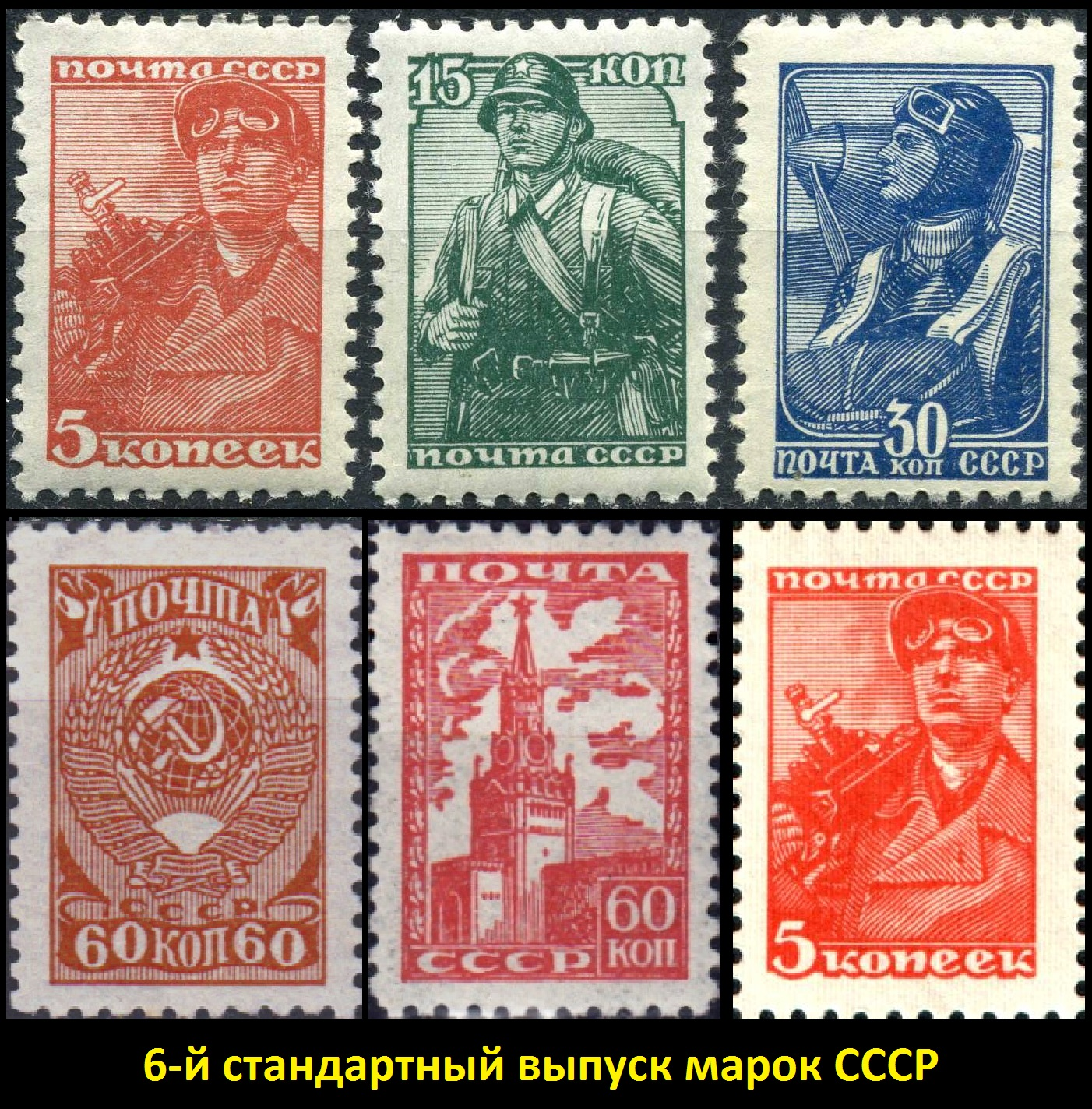 Первая эмиссия началась в августе 1939 года. На трёх миниатюрах номиналами в 5, 15 и 30 копеек художник В. Сидельников изобразил шахтёра, красноармейца и лётчика. В марте 1943 года серию дополнили маркой номиналом в 60 копеек с изображением Герба СССР (автор В. Сидельников). В декабре 1947 года выпущена миниатюра номиналом в 60 копеек с новым рисунком — Спасской башней Кремля. Марки стандартного выпуска переиздавались практически ежегодно до 1960 года, на разной по толщине, цвету и качеству бумаге, в различных оттенках цвета и с систематически повторяющимися графическими отклонениями. Значительное количество марок этого выпуска, особенно в годы войны, попало в обращение с дефектами.